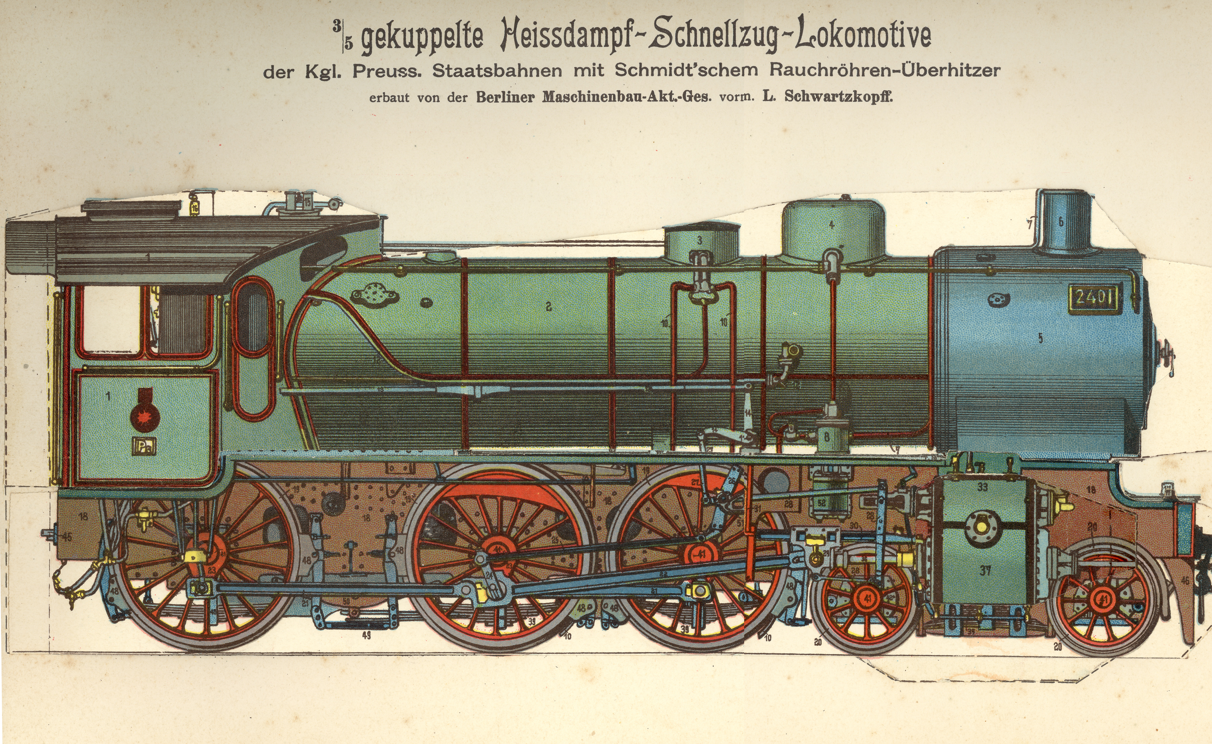 Lokomotive kgl. preußische Staatsbahnen Berliner Maschinenbau AG Die Schöpfungshöhe dieser colorierten technischen Zeichnung ist grenzwertig, der Urheber kann mit vertretbarem Aufwand nicht ermittelt werden (ist in dem genannten Atlas nicht vermerkt). Somit ein Fehler des Herausgebers 1908, er hätte den Urheber nennen müssen.